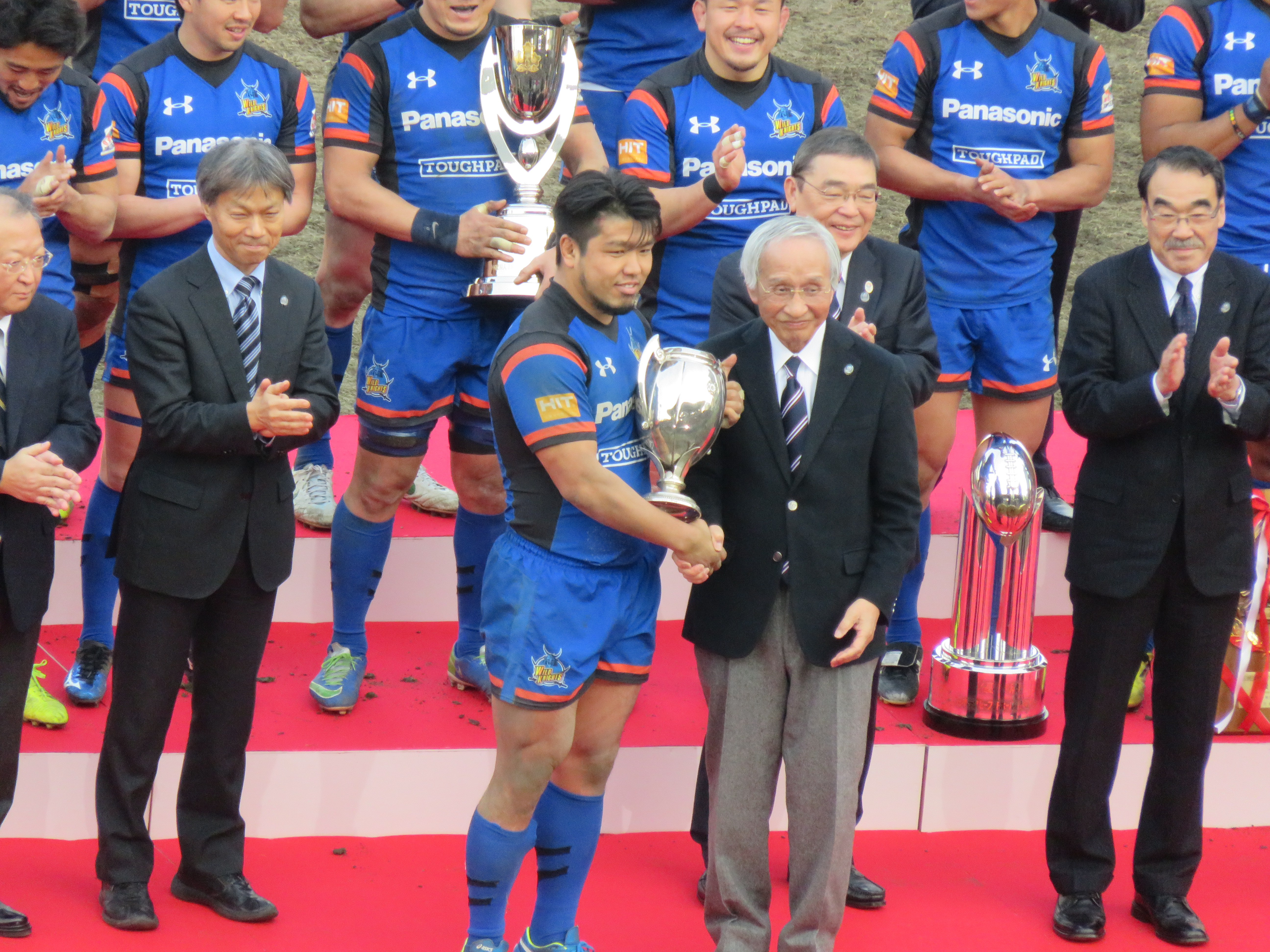 第53回日本ラグビーフットボール選手権大会にて、日本ラグビーフットボール協会の岡村正会長から日本協会優勝杯を受け取る、パナソニック ワイルドナイツの堀江翔太選手